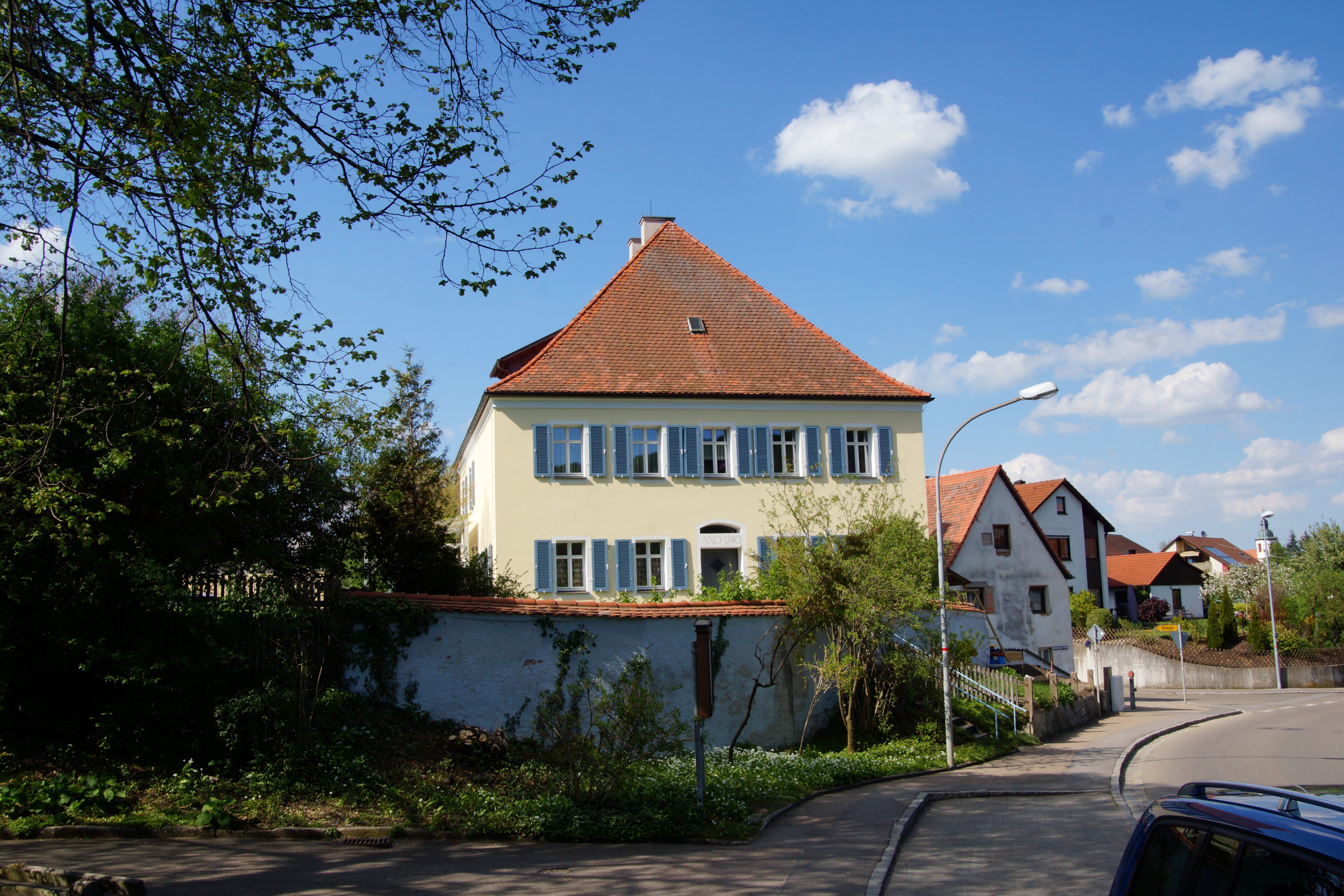 Der evangelische Pfarrhof in Thalmässing